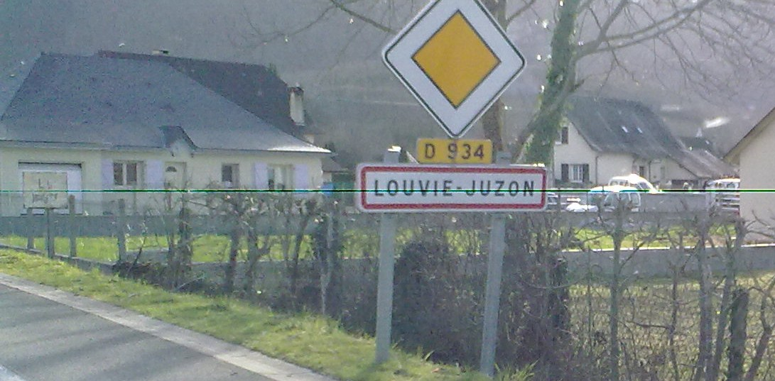 Une entrée nord de Louvie-Juzon